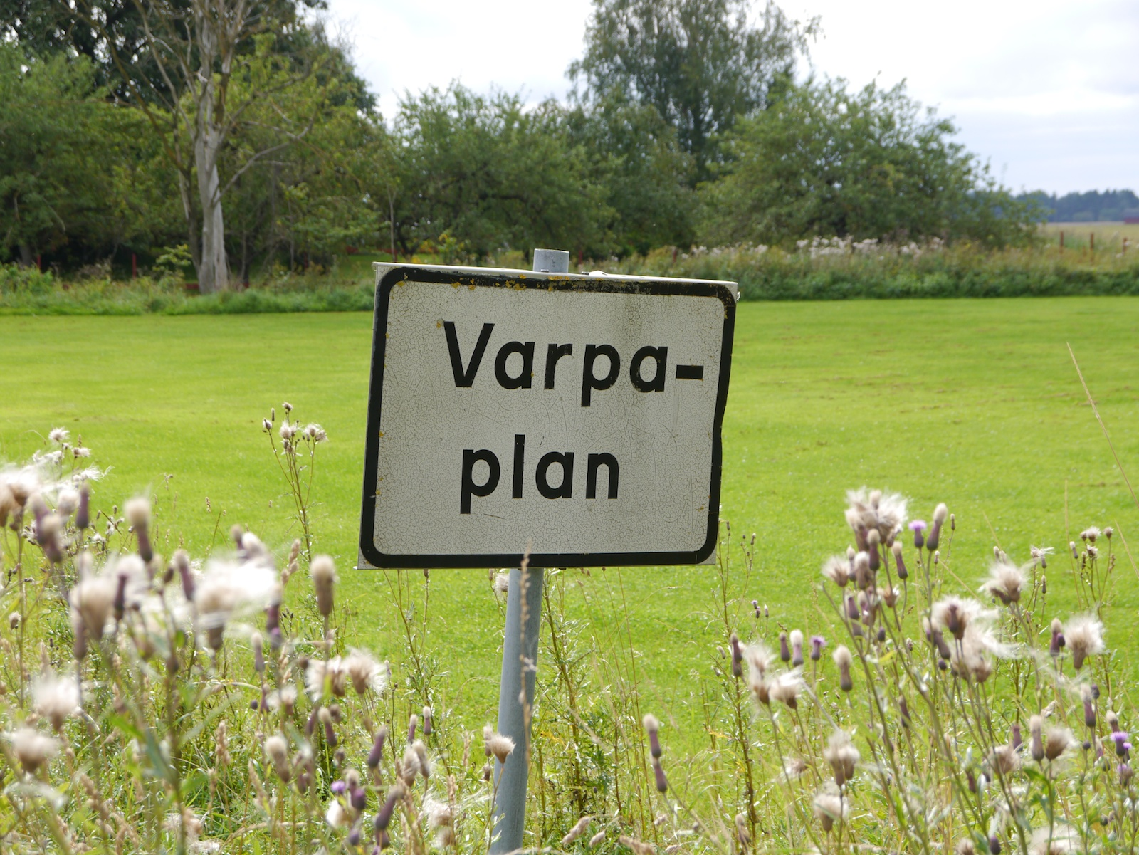 Varpa-plan